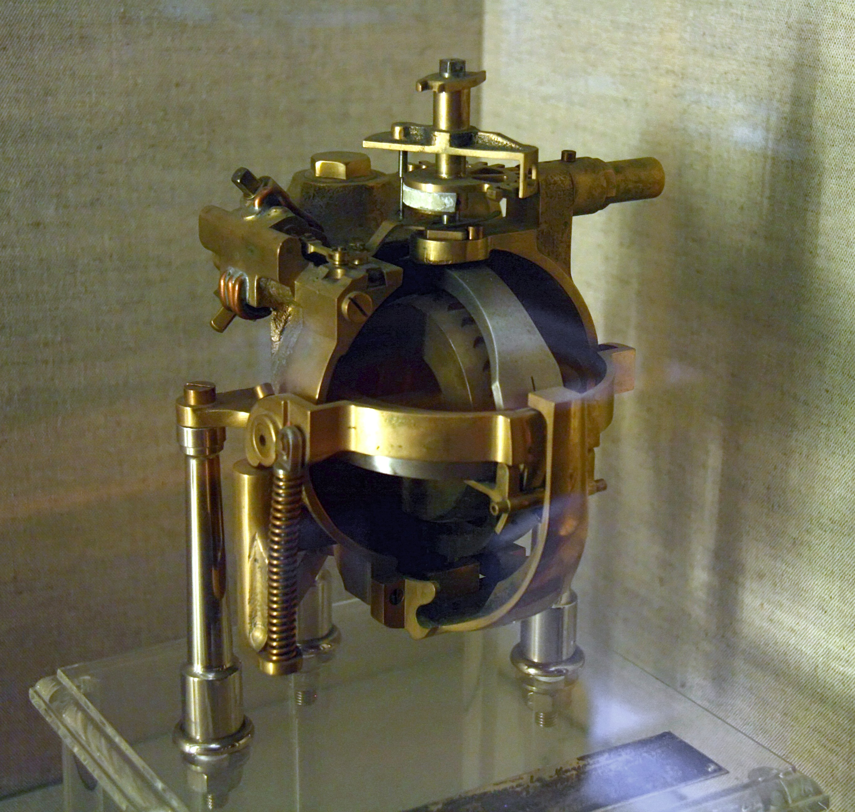 Giróscopo de torpedo (1929) - Construido en el arsenal de torpedos de Cartagena